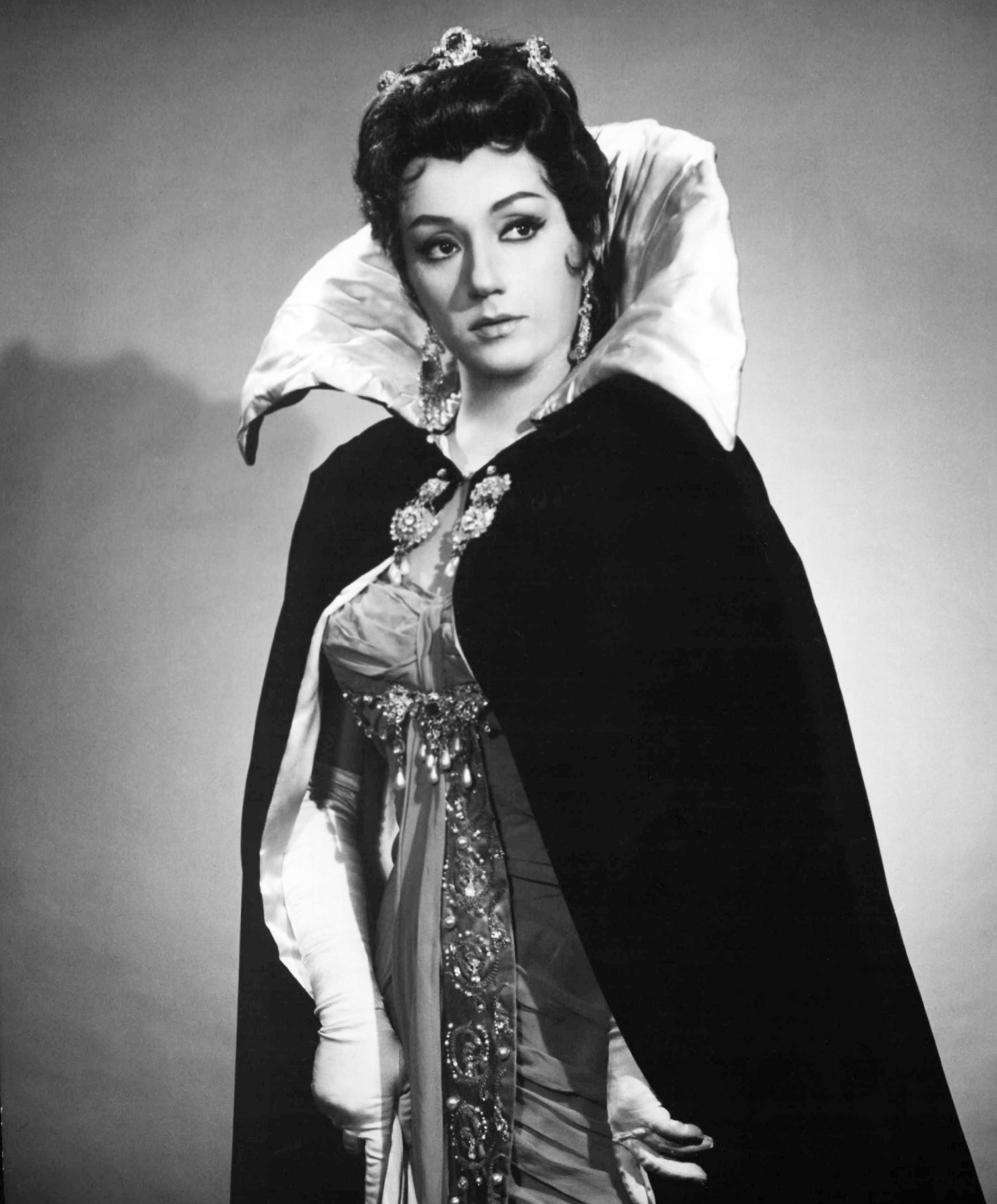 Photo of Gabriella Tucci in Tosca.